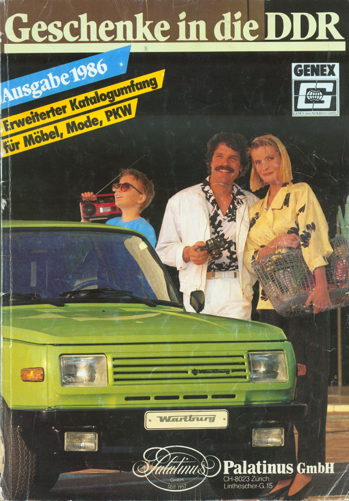 Fotos aus dem Katalog der Genex